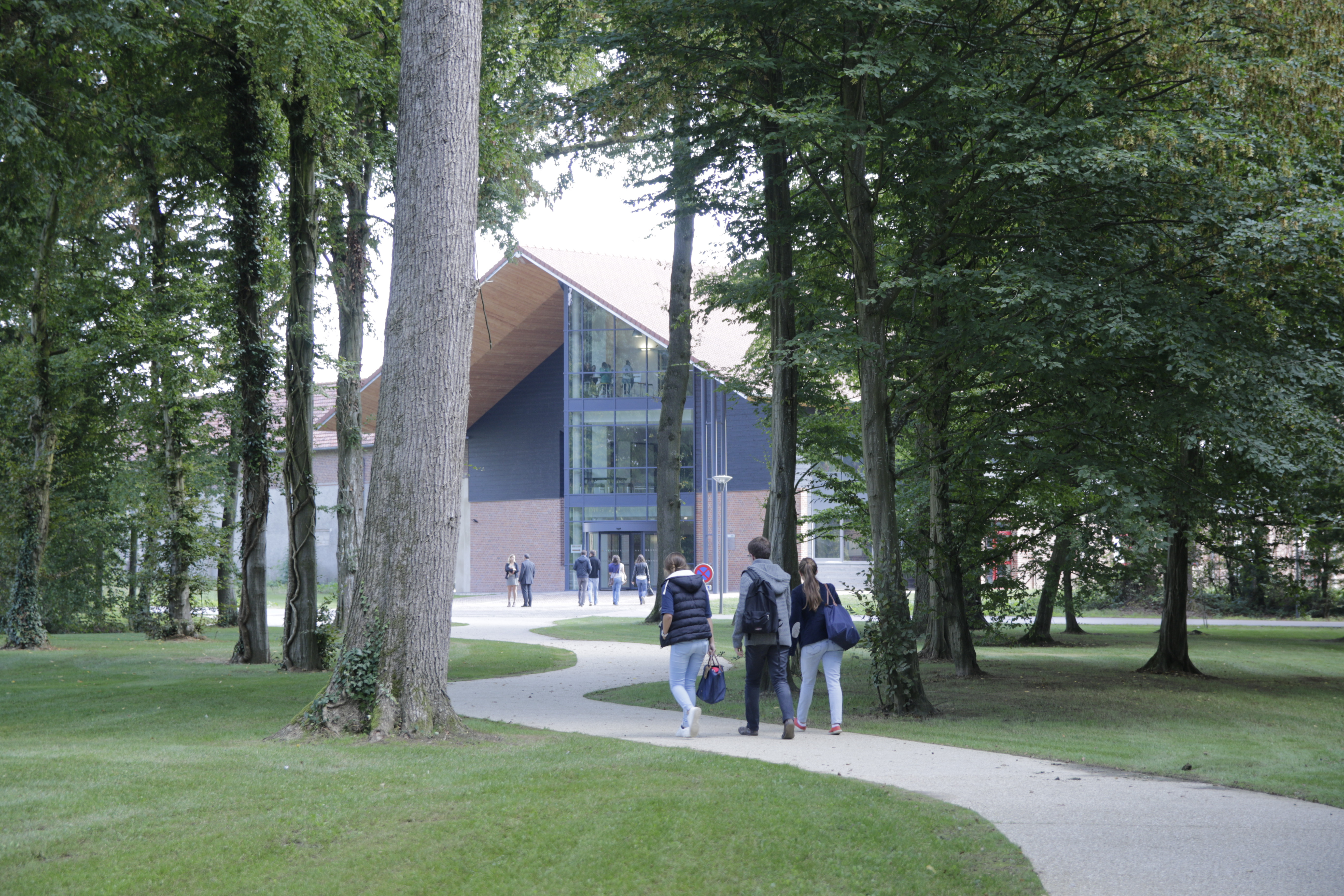 Inaugurée en septembre 2015, LaFerme héberge des salles de cours, un amphi, une salle de réception et un vaste espace de travail collaboratif.